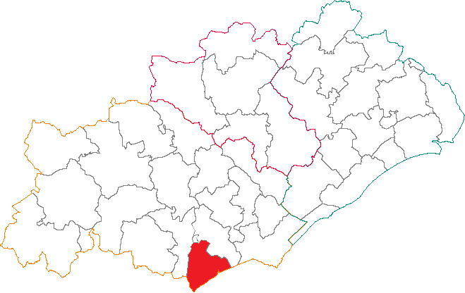 Situation du canton dans le département de l'Hérault.